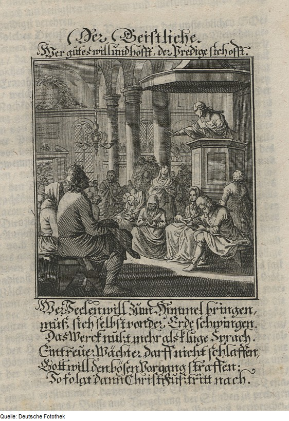 Original image description from the Deutsche Fotothek Ständebuch & Stand & Lehrstand & Geistlicher